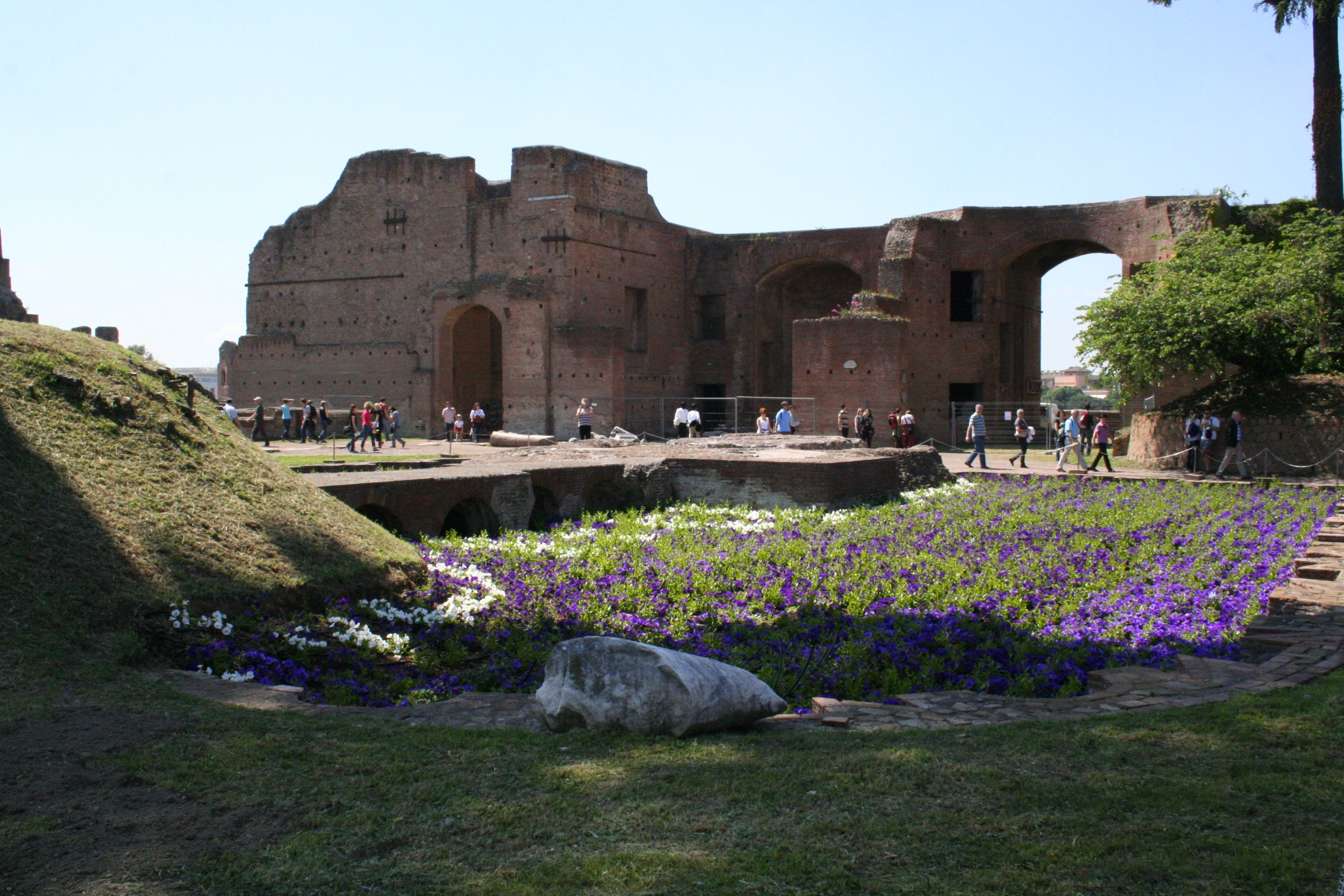 Emplacement du temple de Minerve du Palais de Domitien (sur la plateforme à l'extrémité du petit pont).